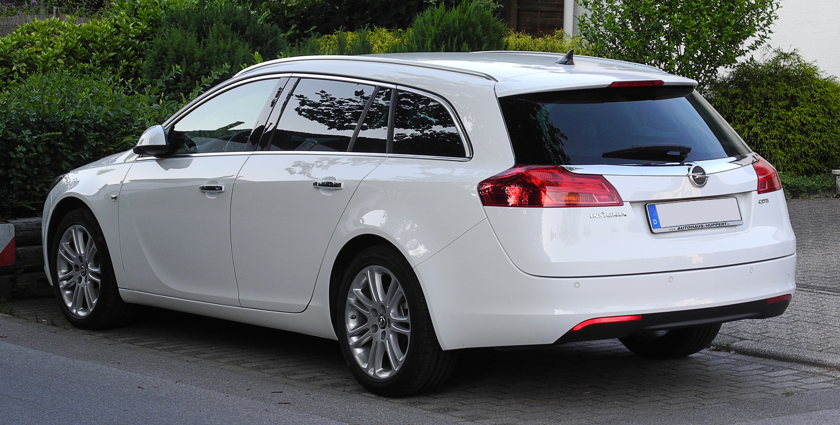 Opel Insignia Sports Tourer 2.0 CDTI